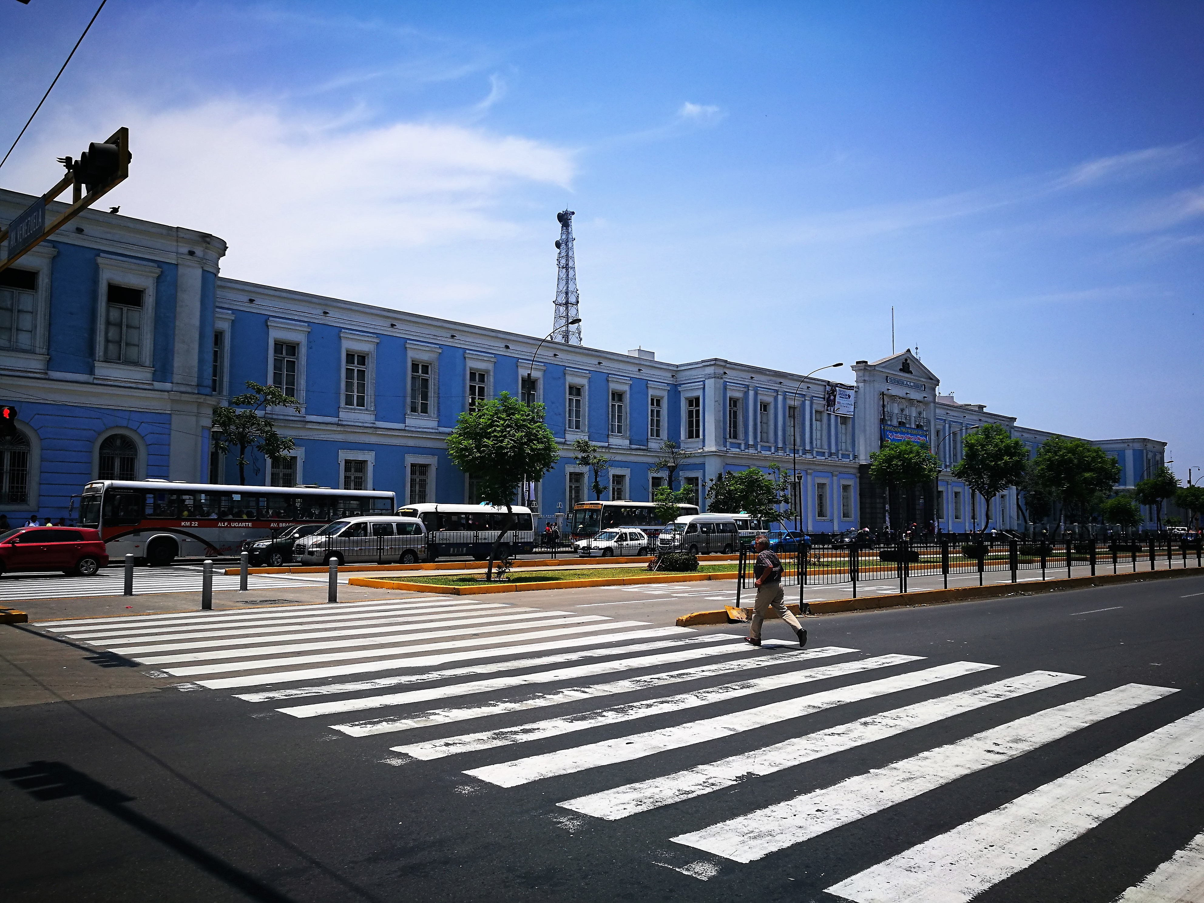 Primer Colegio Nacional de la República Nuestra Señora de Guadalupe al Districte de Lima